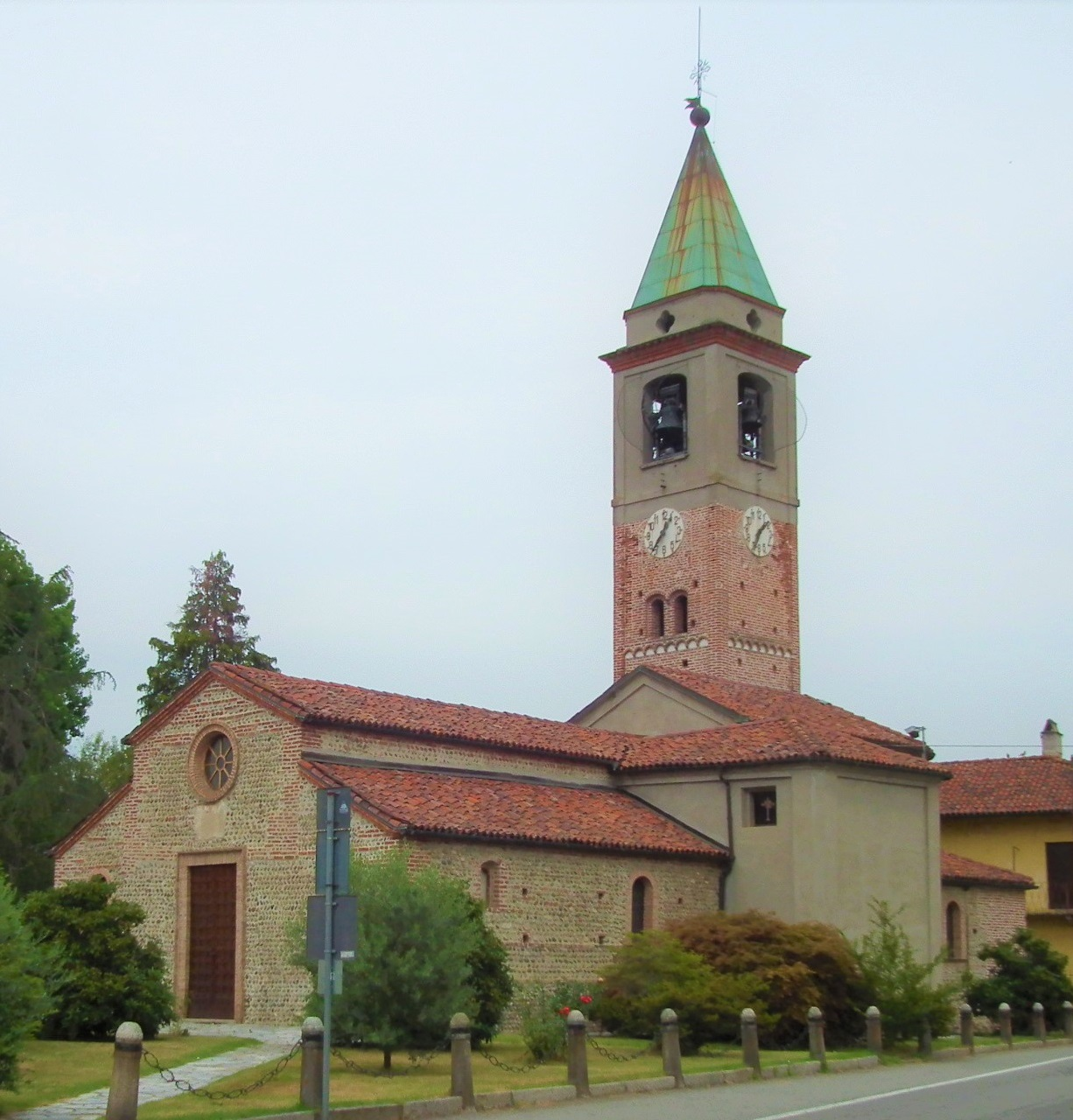 Chiesa parrocchiale di San Lorenzo a Mandello Vitta